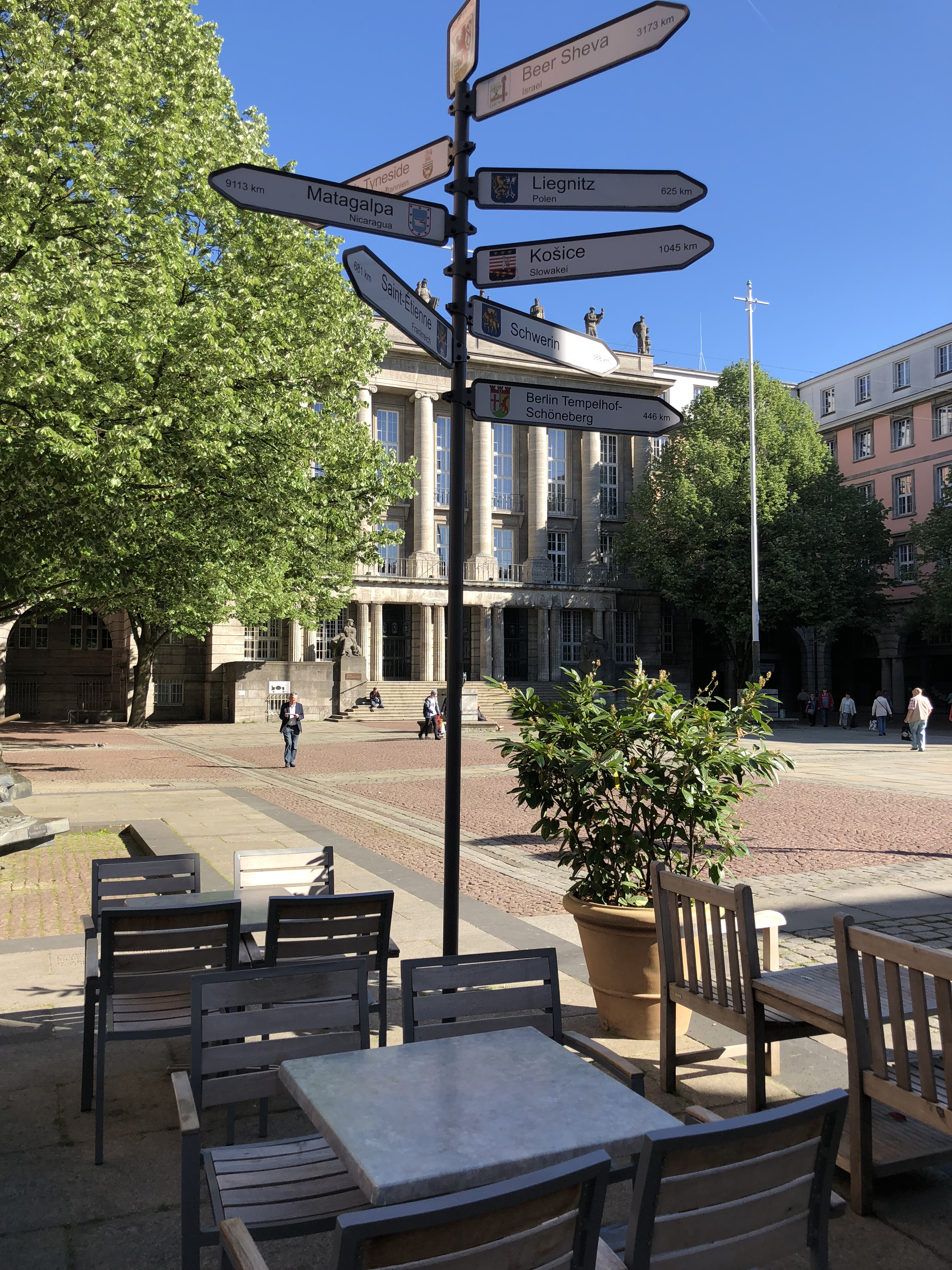 Johannes-Rau-Platz, Wuppertal